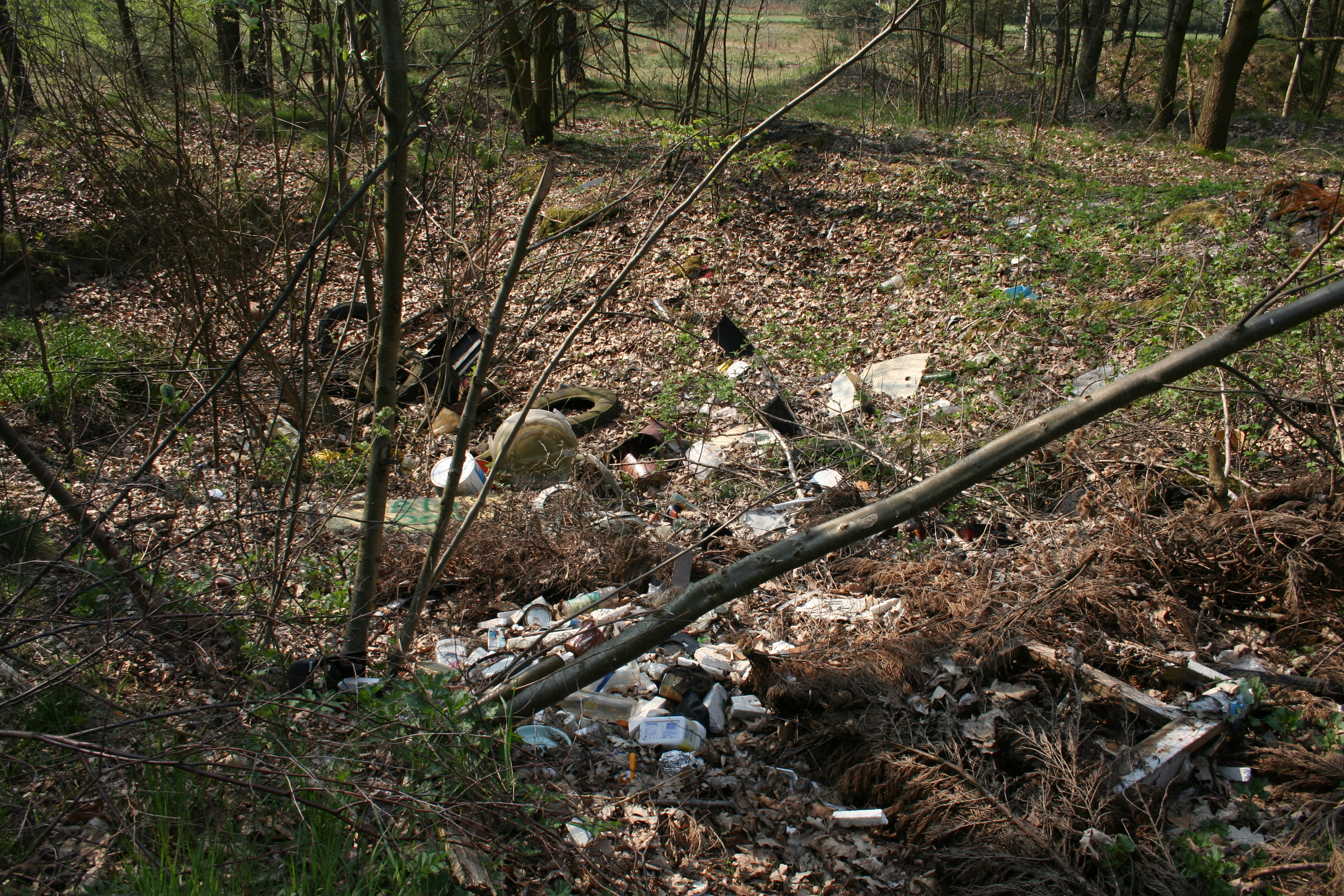 wysypisko niezorganizowane